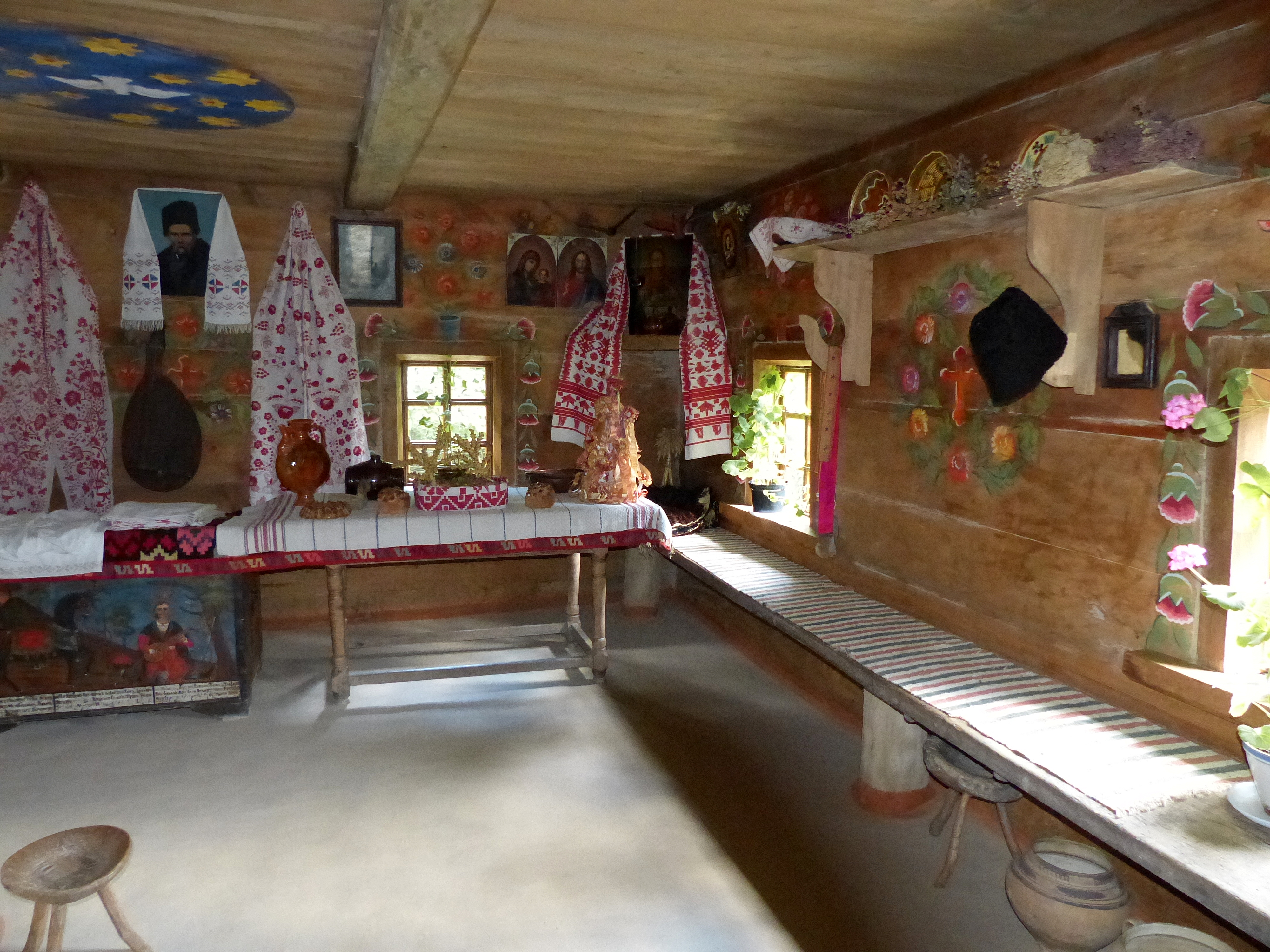 Хата з села Мамекине Новгород-Сіверського району Чернігівської області, Київ, Пирогів